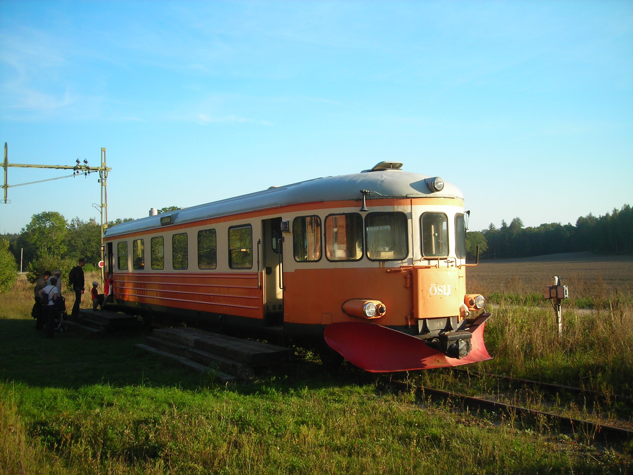 Museibanans dag: Rälsbussen står i Taxinge-Näsby, kl. 17:01.